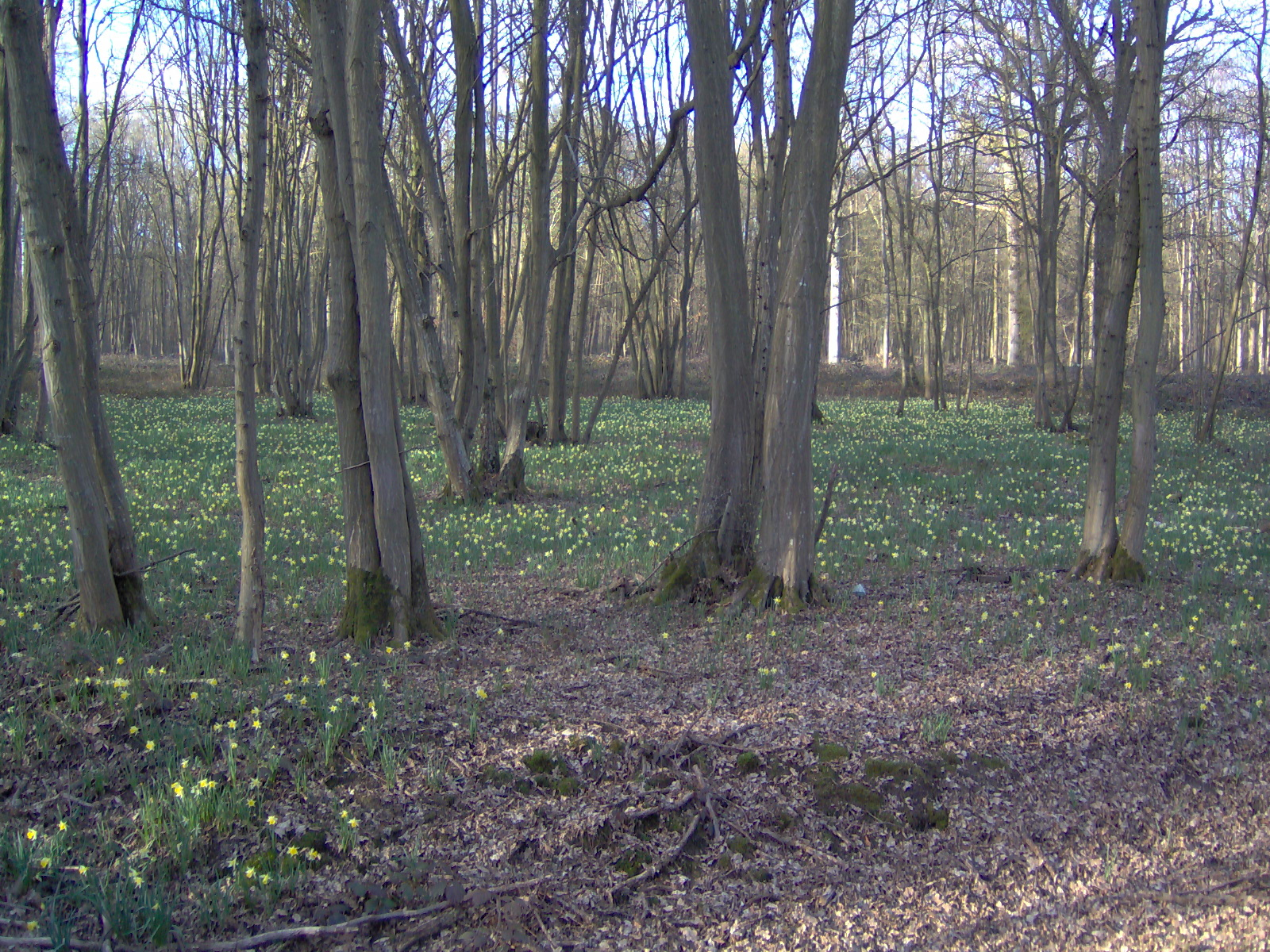 Parterre de jonquilles dans la Forêt de Sénart à Tigery.